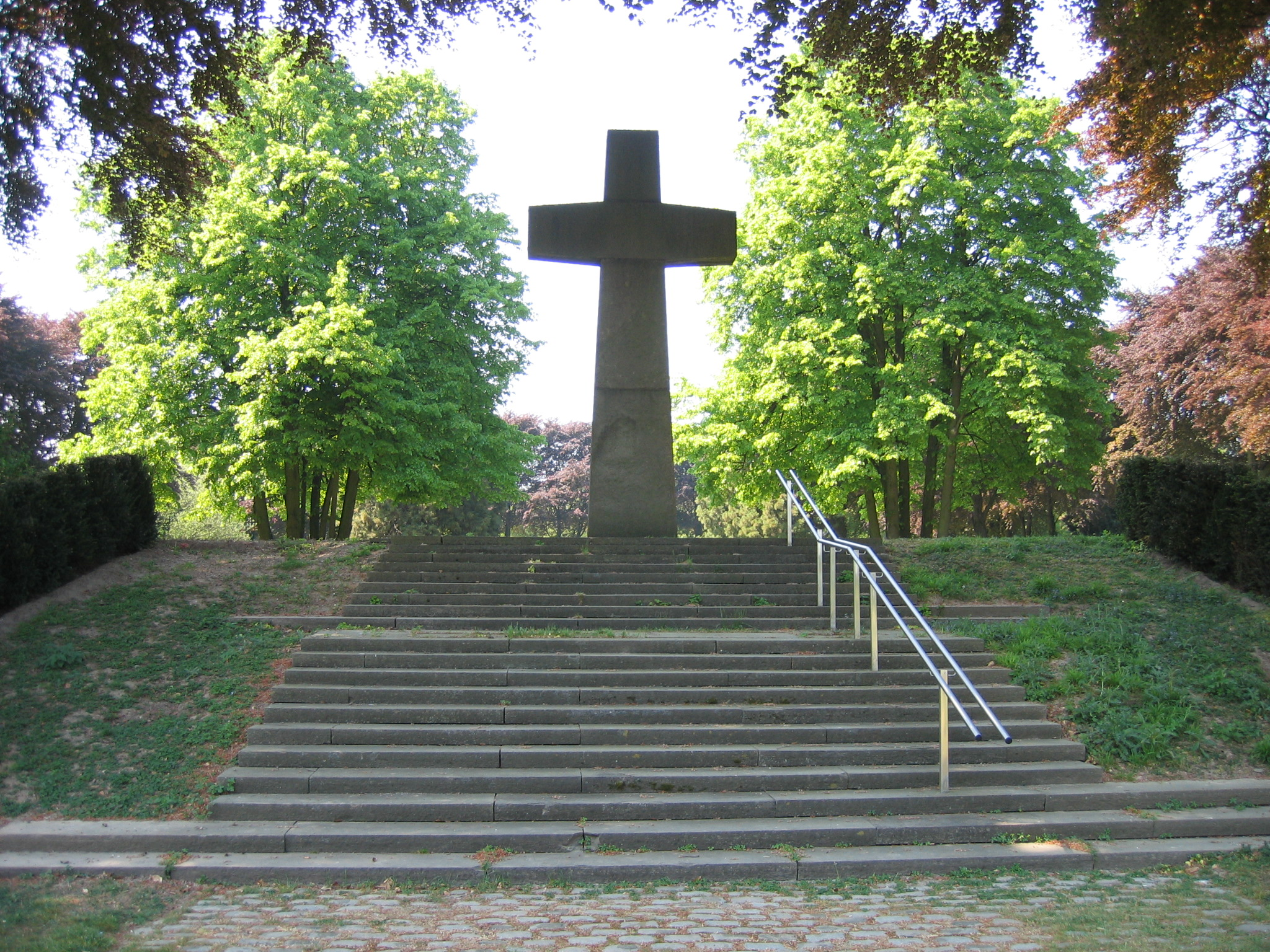 Südfriedhof (Köln)